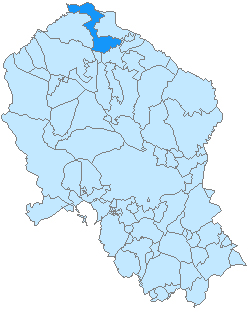 Mapa de El Viso en la provincia de Córdoba, Andalucía, España.